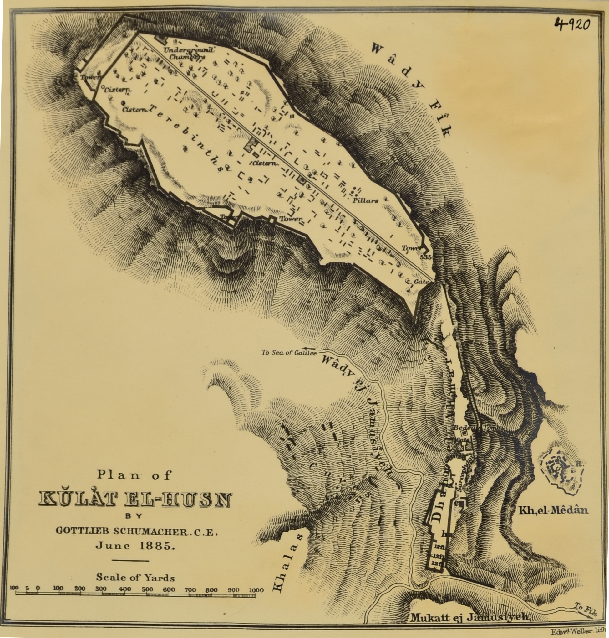 תוכנית של האתר הארכאולוגי סוסיתא כפי ששורטטה על ידי גוטליב שומאכר ב-1885